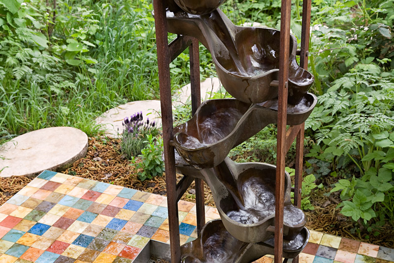 Flowform Vortex Garten Darmstadt